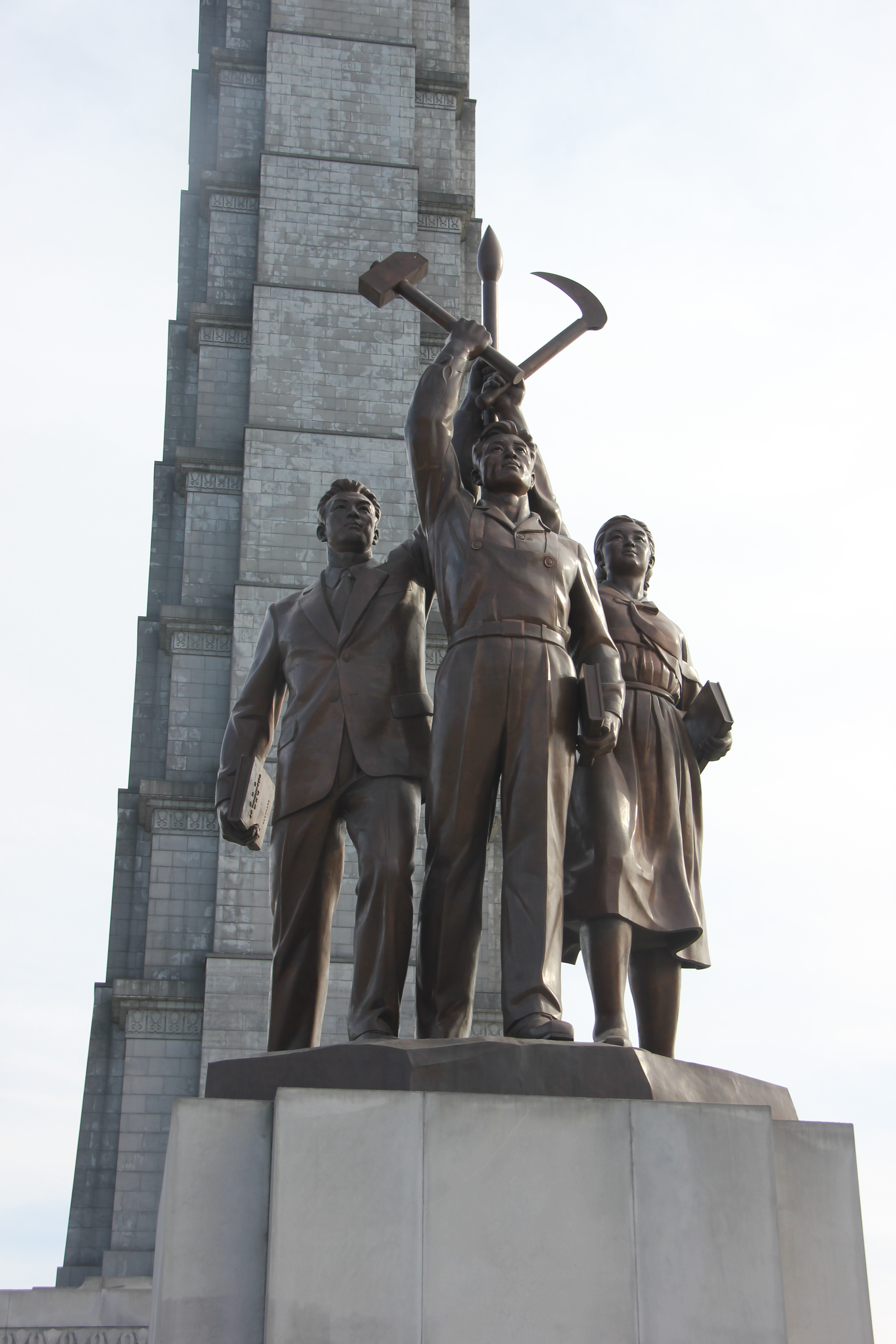 Juche Tower